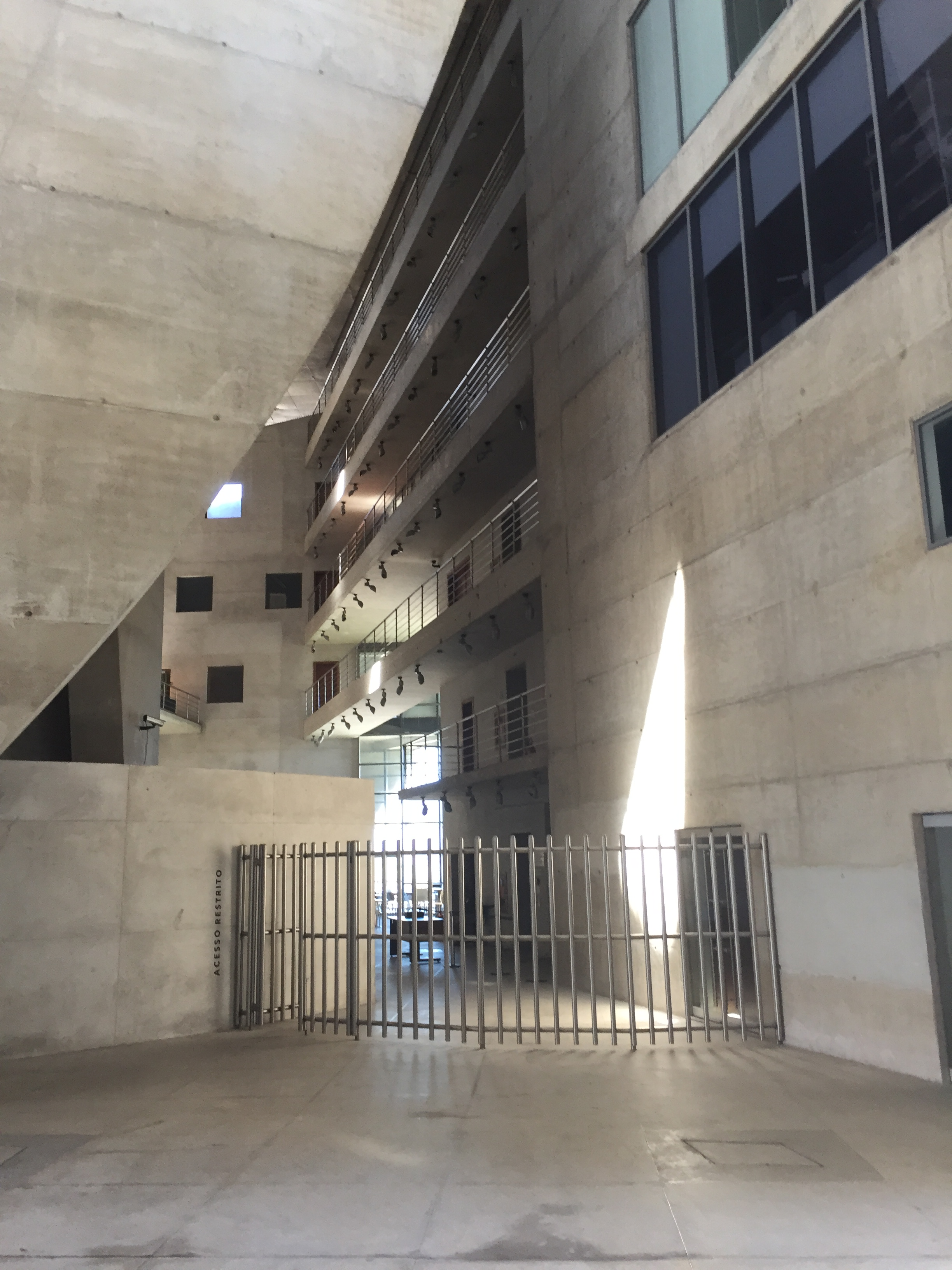 Detalhes da Cidade das Artes